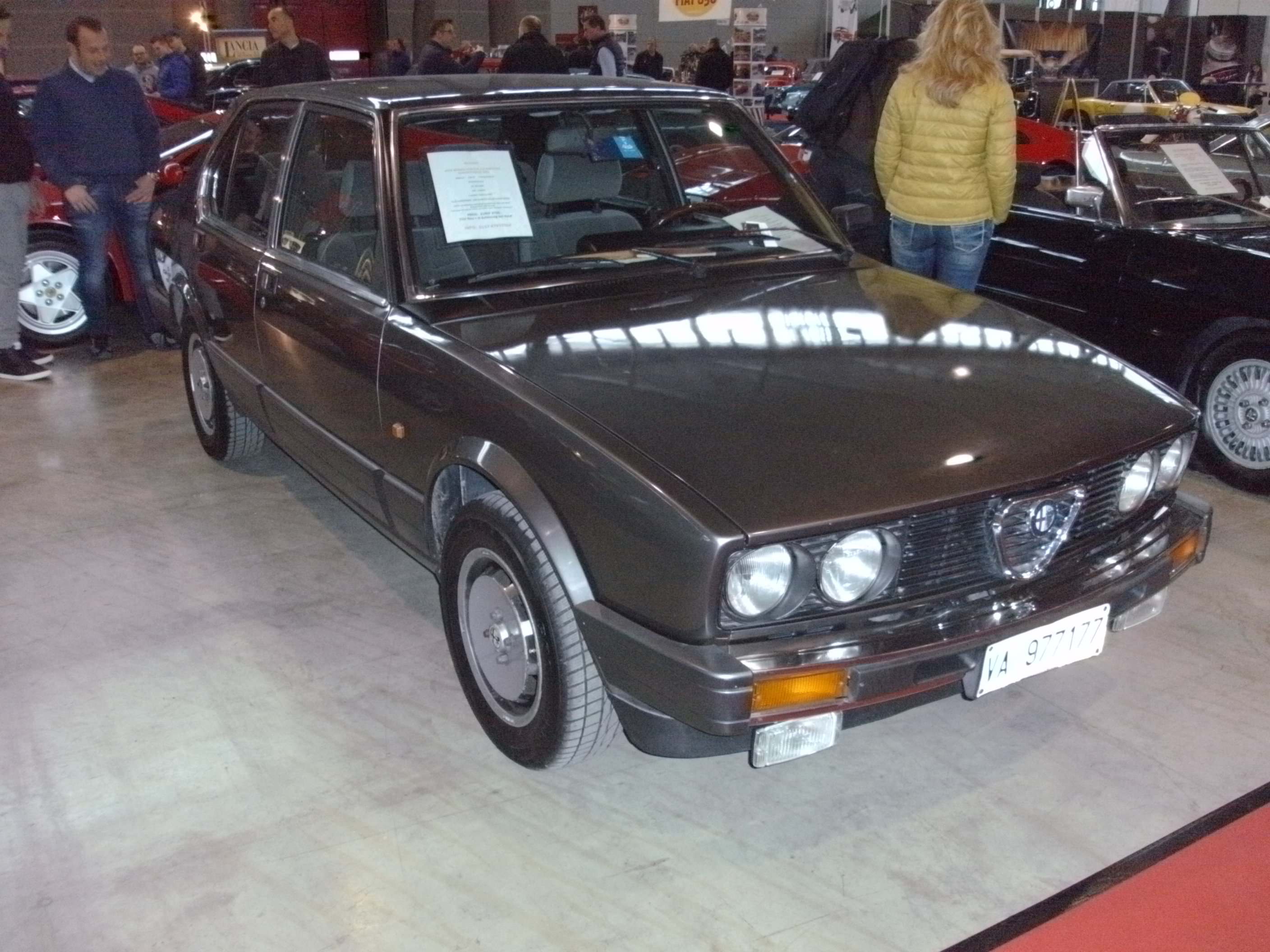 Alfa Romeo Alfetta 2.0, Baujahr 1984, 130 PS